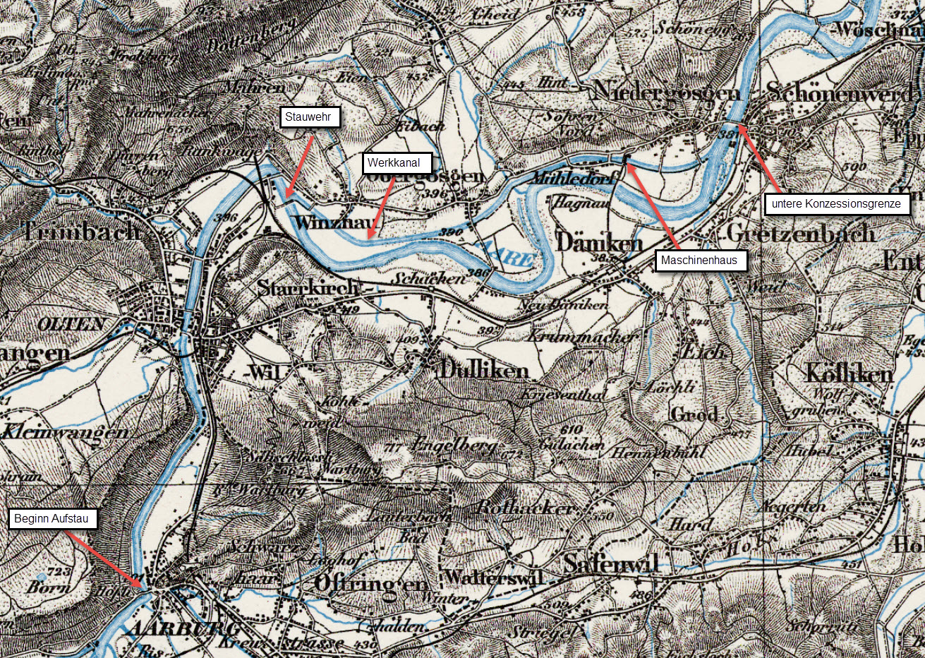 Darstellung des Elektrizitätswerk Olten-Gösgen auf der Landeskarte 1:100.000. Datenstand 1928.